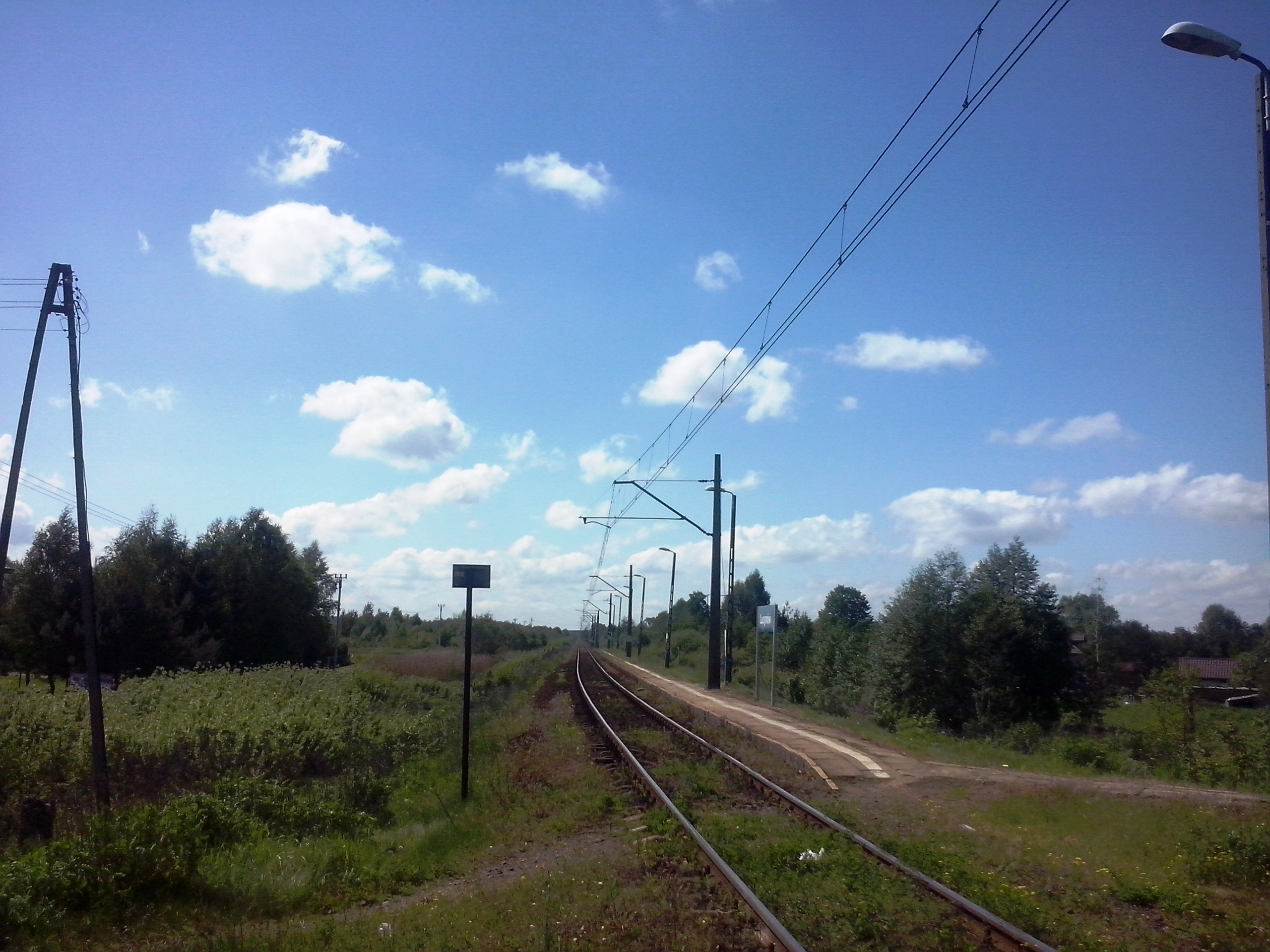 Lucynów - przystanek kolejowy